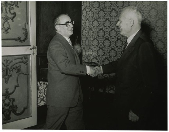 Il presidente della Camera dei Deputati Alessandro Pertini riceve l'amministratore delegato della Rai Gianni Granzotto